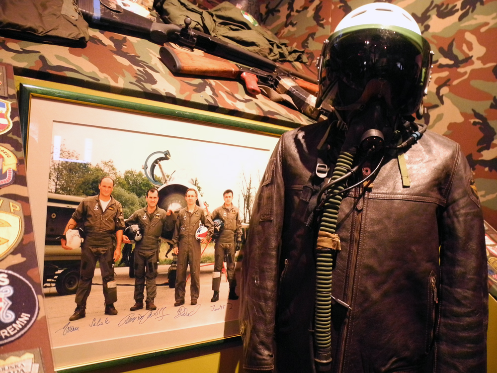 Izložba Domovinski rat u Hrvatskom povijesnom muzeju tijekom Noći muzeja (pozainska slika: Ivan Selak, Rudolf Perešin, Danijel Borović i Ivica Ivandić).